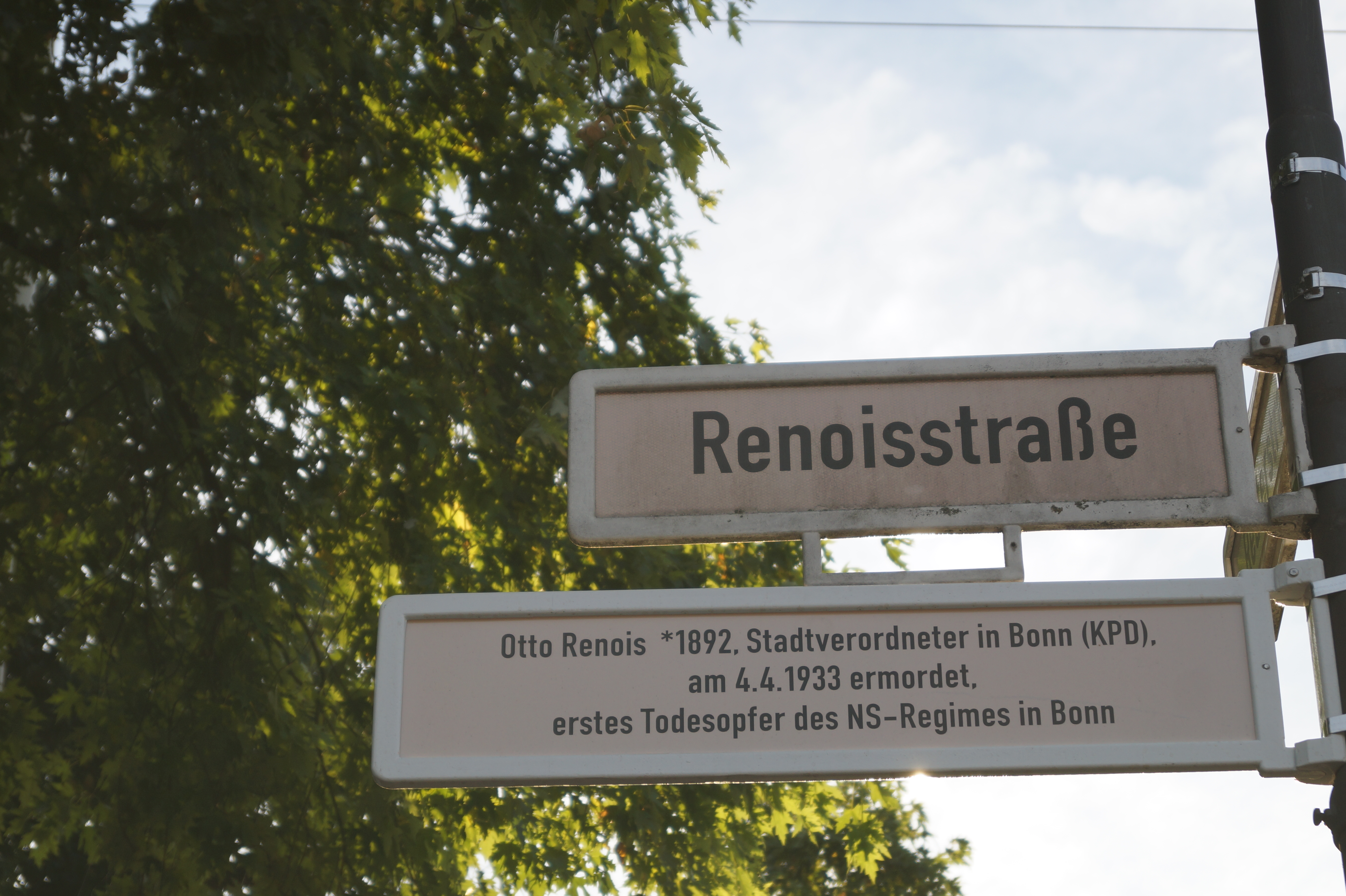 Straßenschild in der Bonner Reutersiedlung zu Ehren von Otto Renois mit neuem Legendenschild (2018)